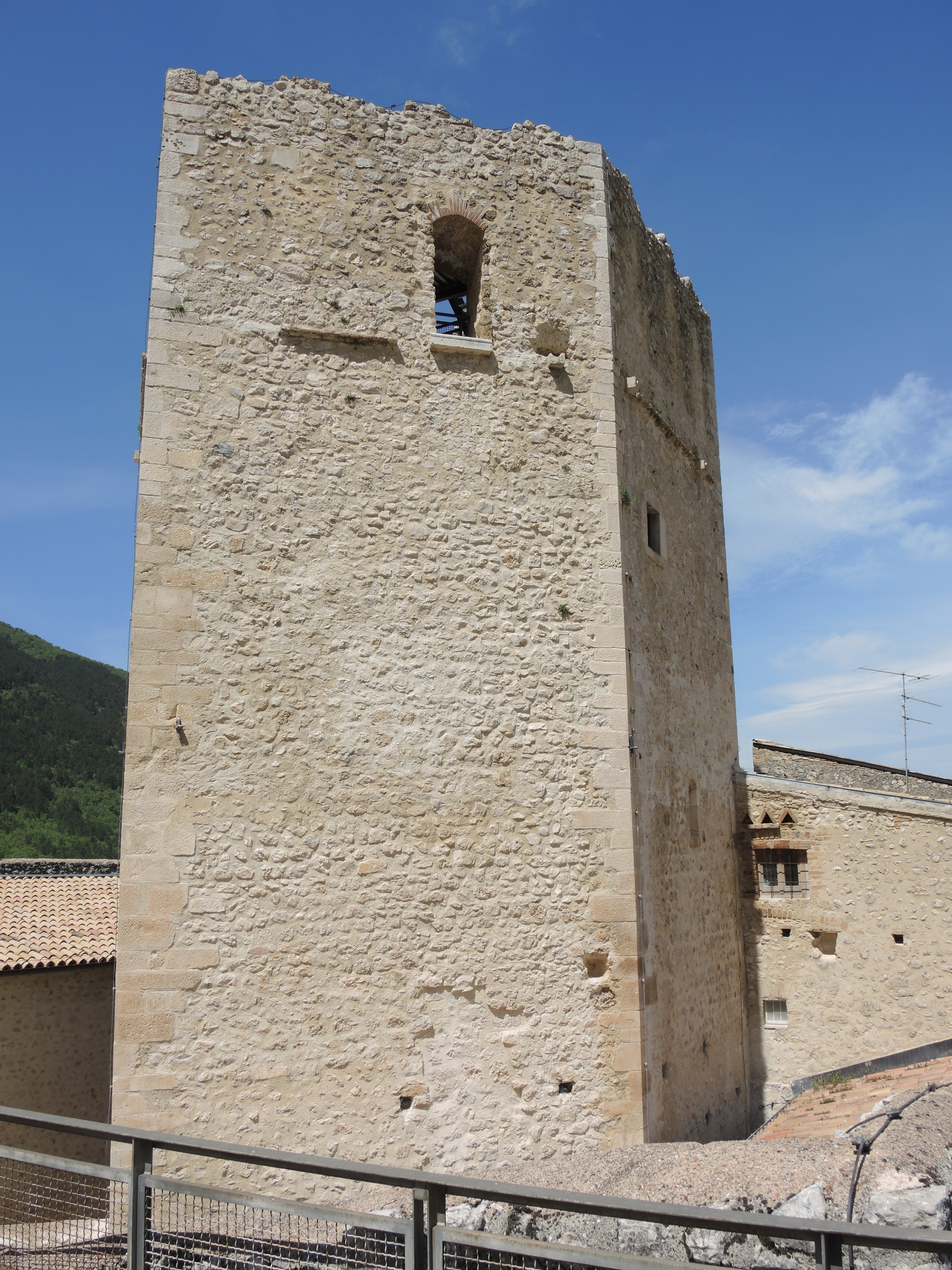 Pettorano sul Gizio: Castello Cantelmo